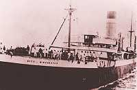 Der britische Frachter City of Westminster, erster Kriegsverlust eines britischen Handelschiffs